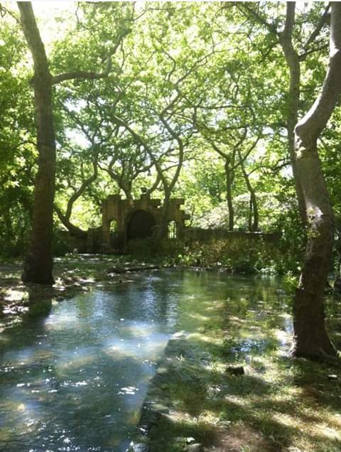 الطبيعة بجانب نبع الفوار